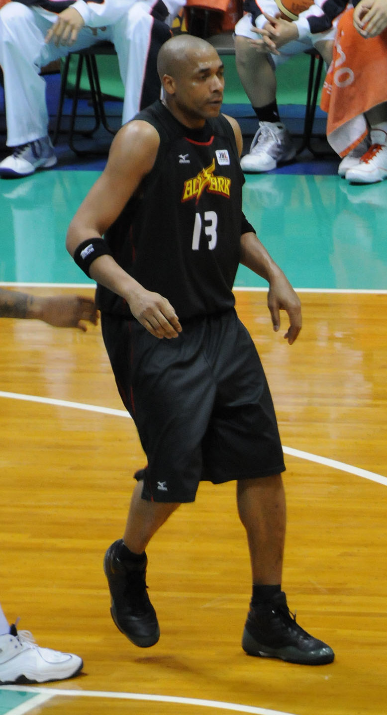 トヨタ自動車アルバルク、チャールズ・オバノン選手。代々木第二体育館で。